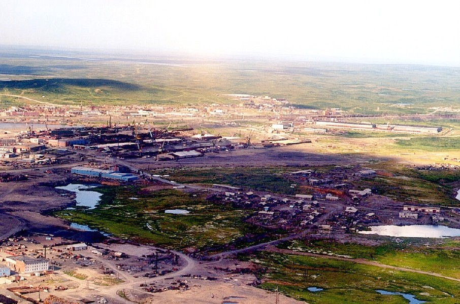 Hafenanlage und Tundra in der geschlossenen Stadt Dudinka am Jenissei in Sibirien, Russland.